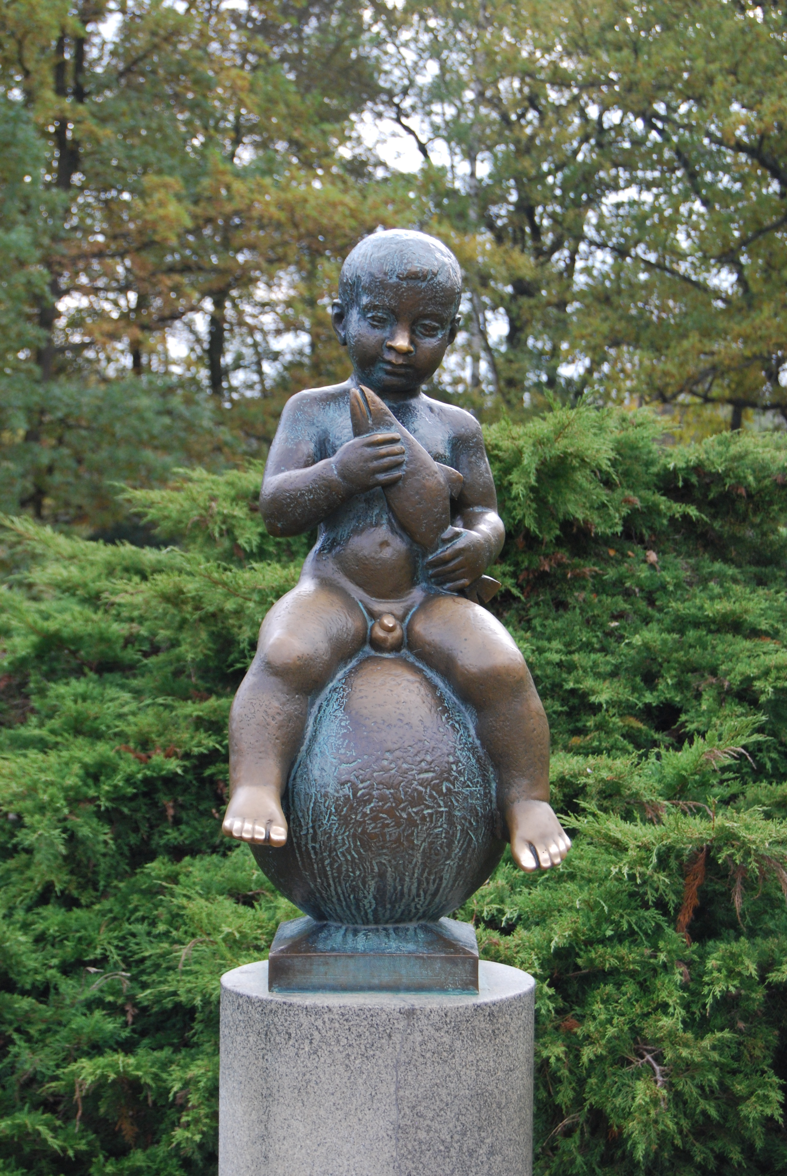 Malý František. Františkovy Lázně. Okres Cheb. Čechy.